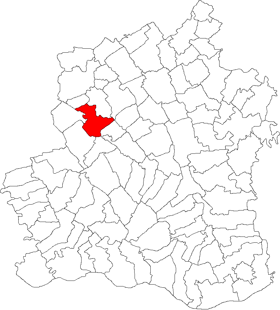 Categorie:Hărţi ale judeţului Teleorman